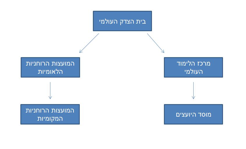 היררכיה במנגנון המנהל הבהאאי